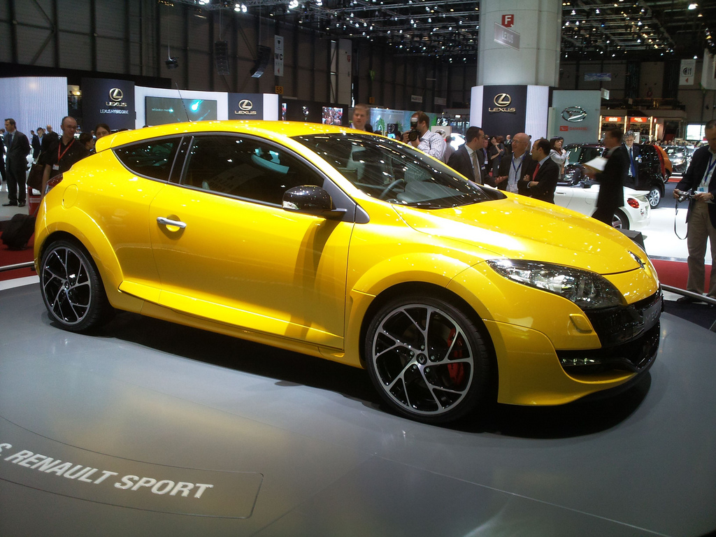 Renault Megane III RS au Salon de Genève 2009